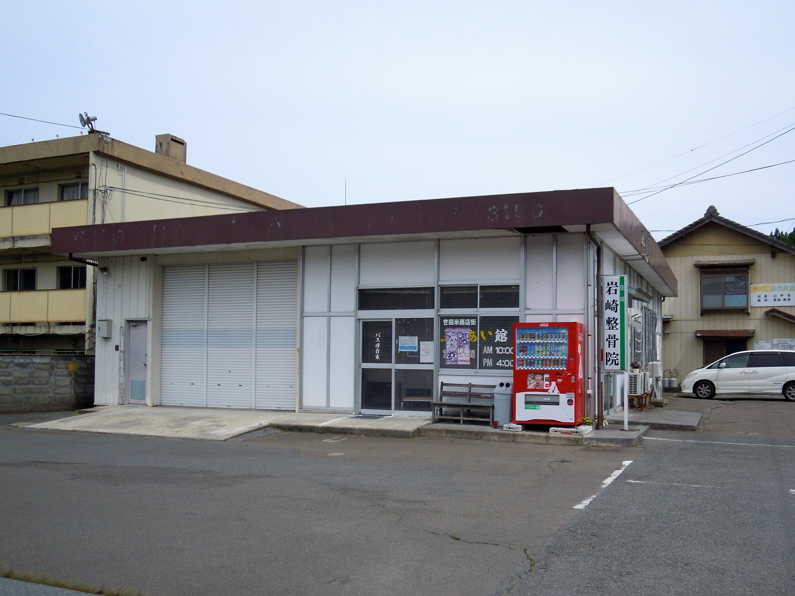 岩手県気仙郡住田町にある世田米バスストップ。2017年現在、建物の大半は店舗と地元の倉庫となっており、待合室は写真手前のガラス戸の部分のみ。